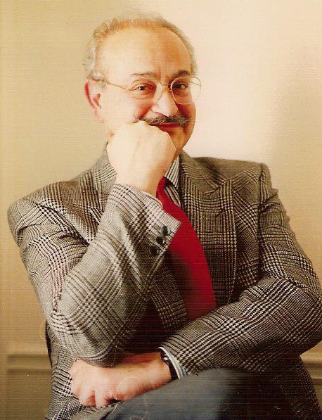 Féri Farzaneh